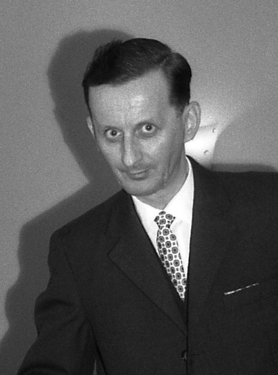 Dr. Gustav Holzmann, österreichischer Wirtschaftsgeograph und Historiker 1926-1973